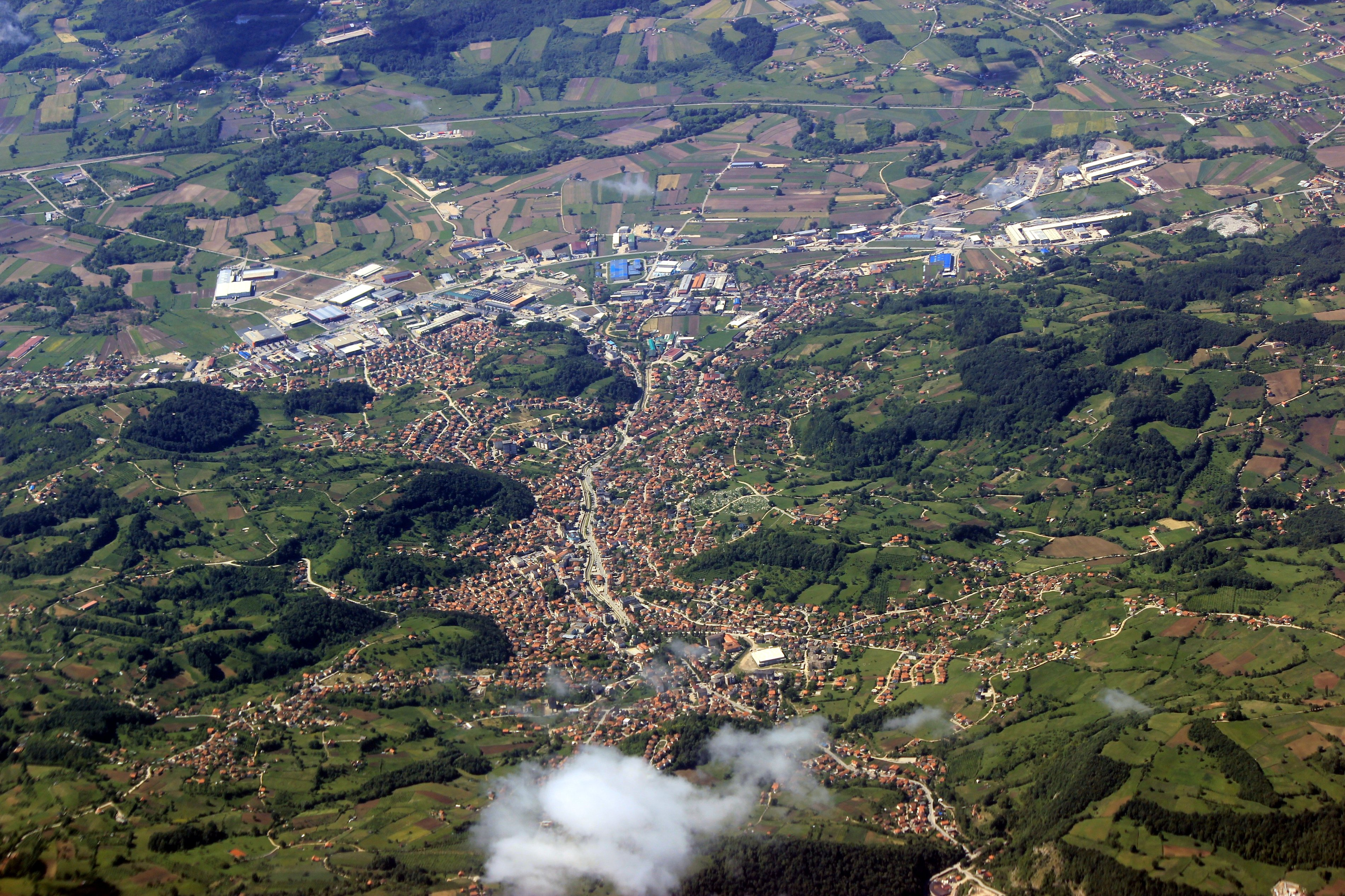 Luftbild von Gračanica (BiH).